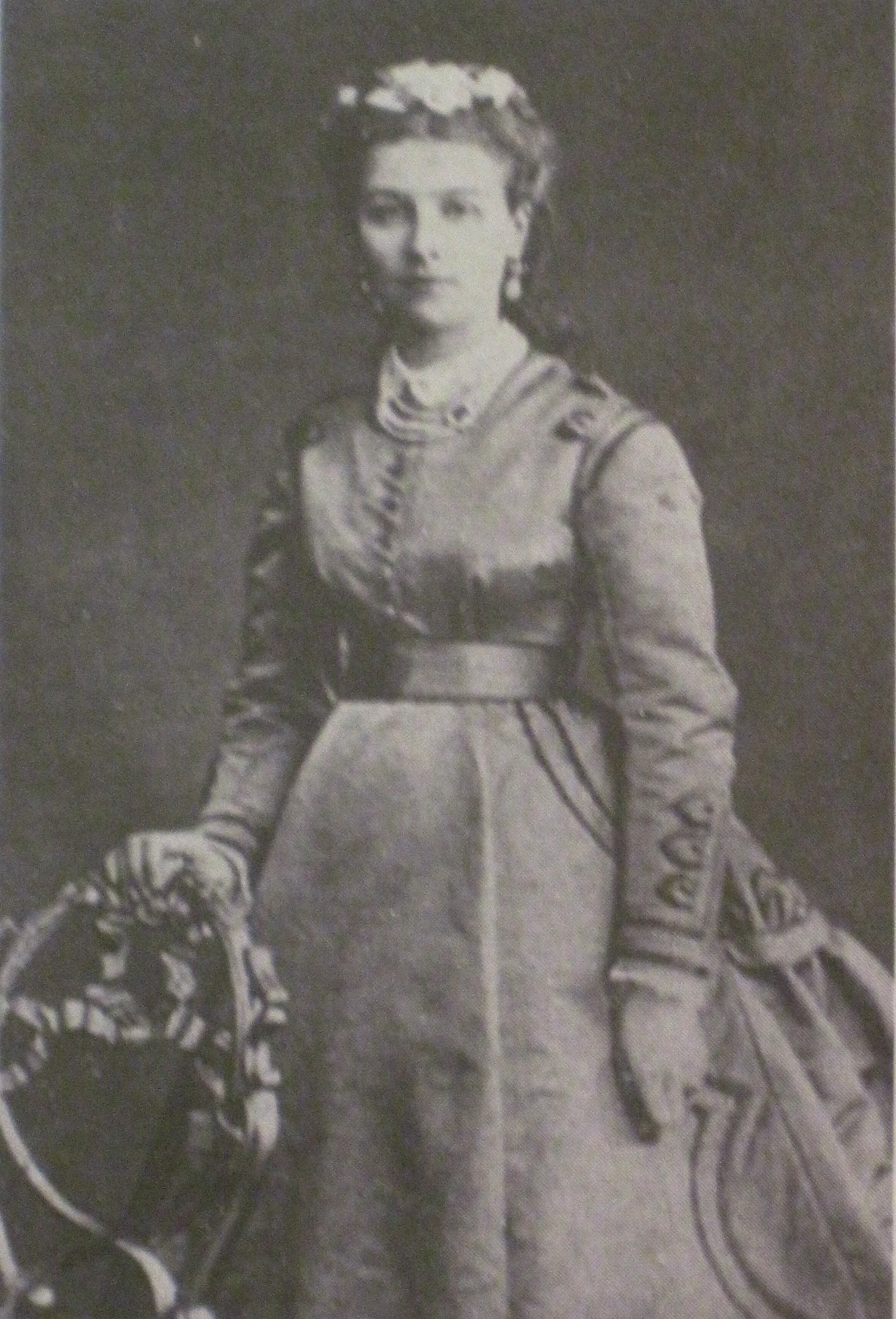 Фота княгіні Клеапатры Міхайлаўны Святаполк-Мірскай (Ханыкавай)